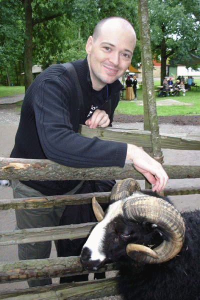 Zoran Krušvar